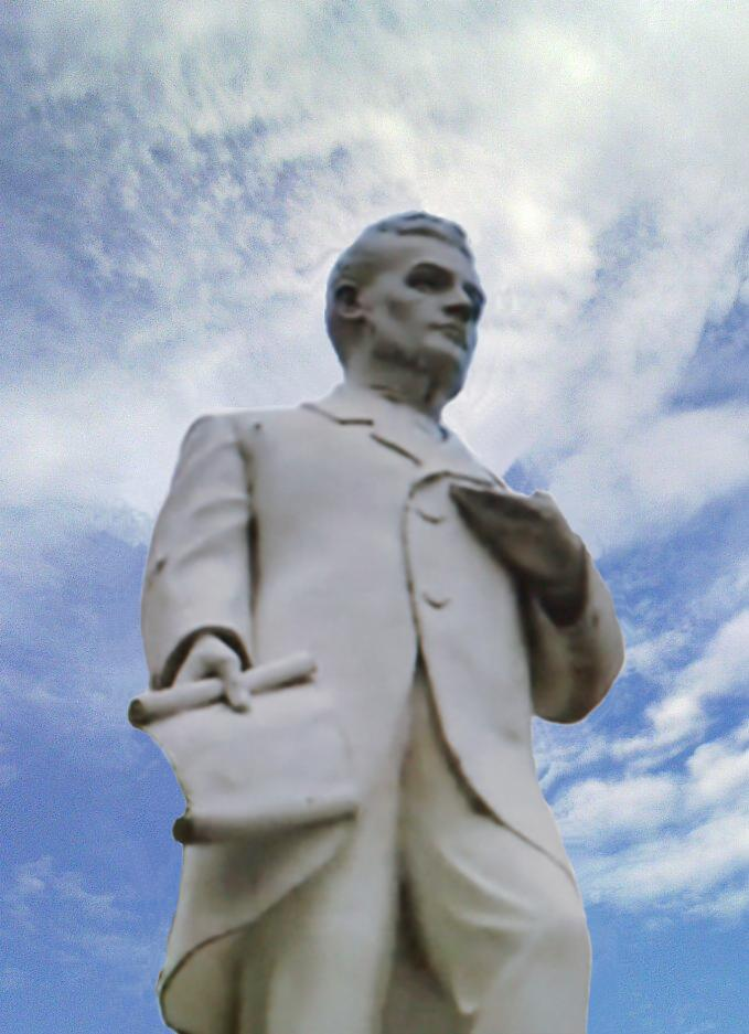 Estatua del General Francisco Morazan ubicada en el Boulevard Francisco Morazan de San Pedro Sula, Honduras